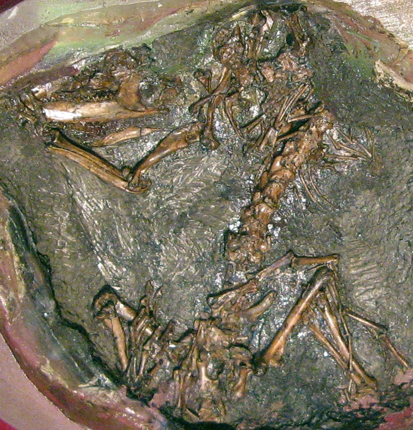 Reprodução do esqueleto de um Henkelotherium guimarotae, com c.5cm, exposto no Museo Geológico de Lisboa (Portugal).